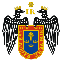 escudo provisional